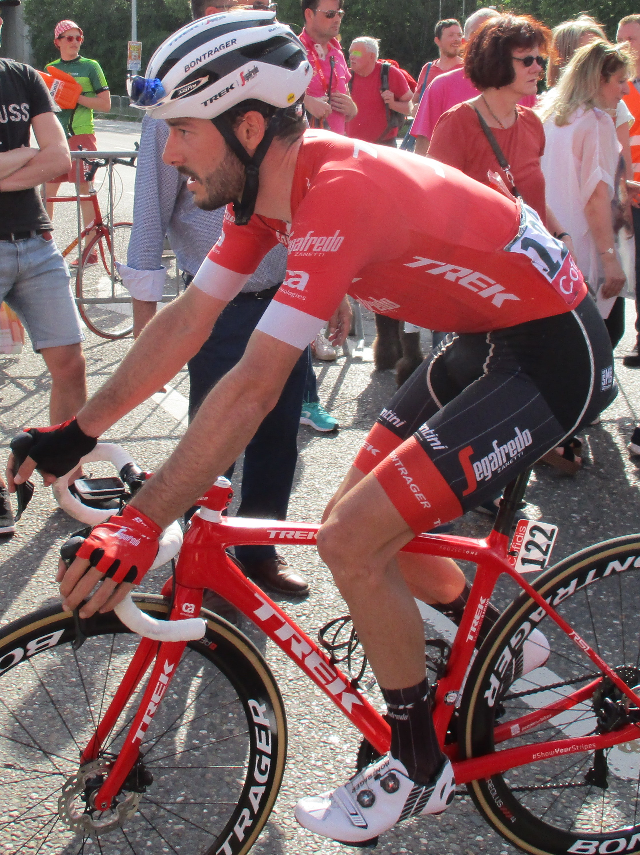 Finish van Luik-Bastenaken-Luik 2018 in Ans.